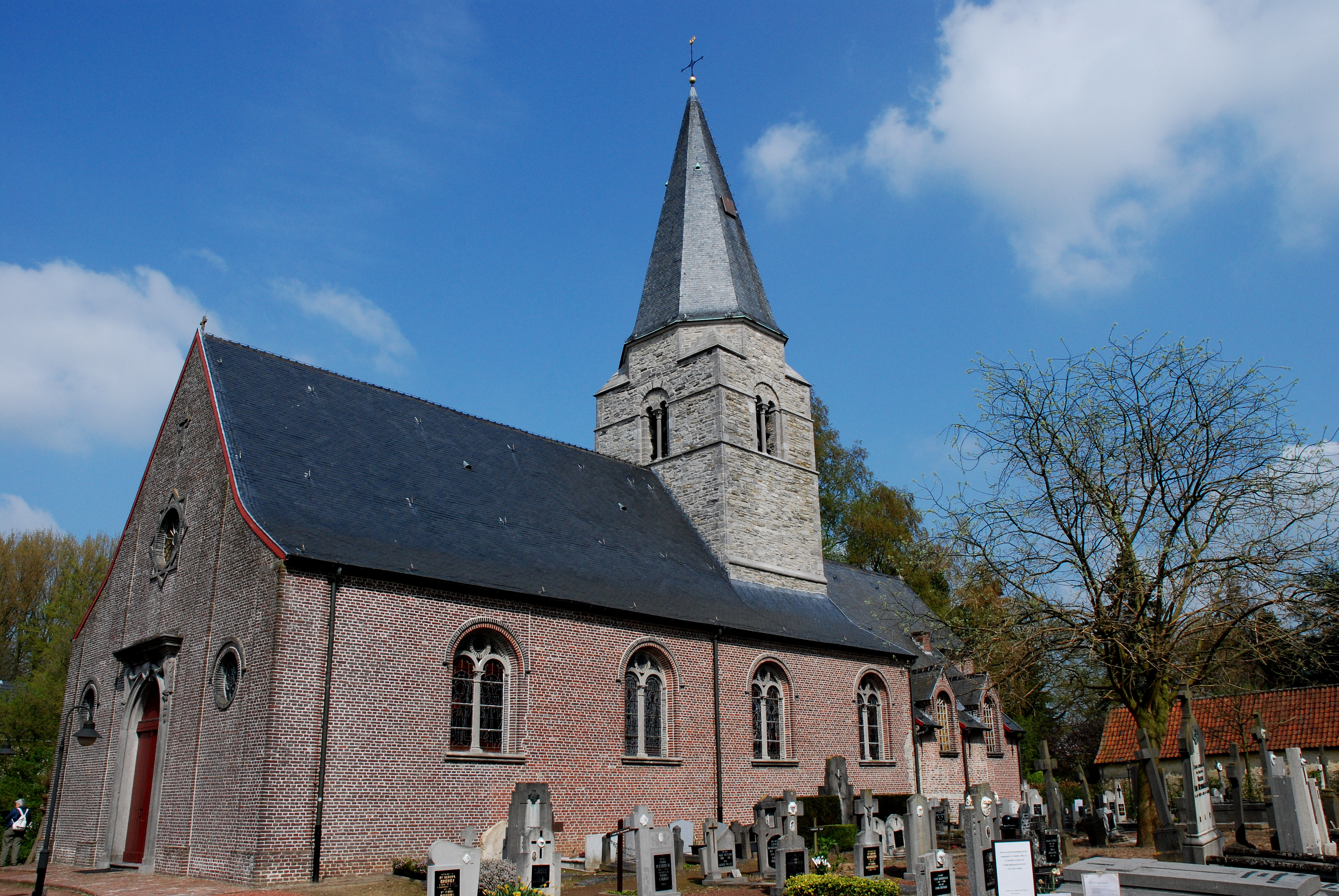 De kerk te Mullem, deelgemeente van Oudenaarde, België